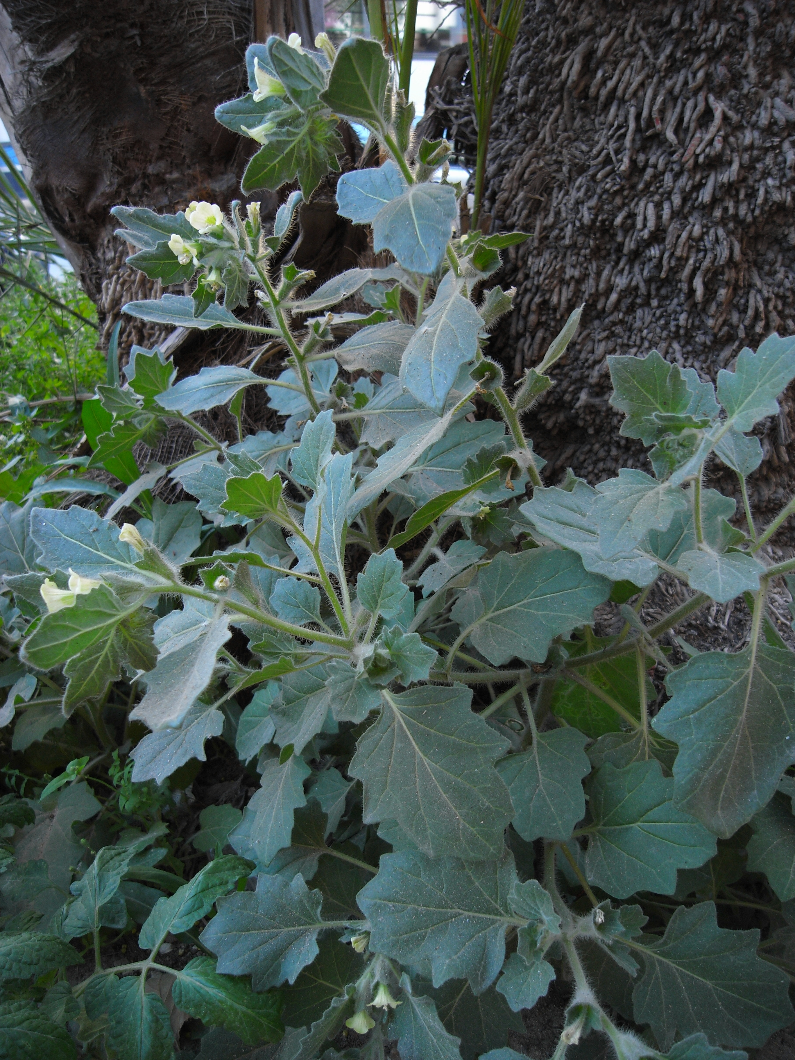 Habitus von Hyoscyamus albus, an der Stadtmauer von Sousse, Tunesien, Ende April 2009